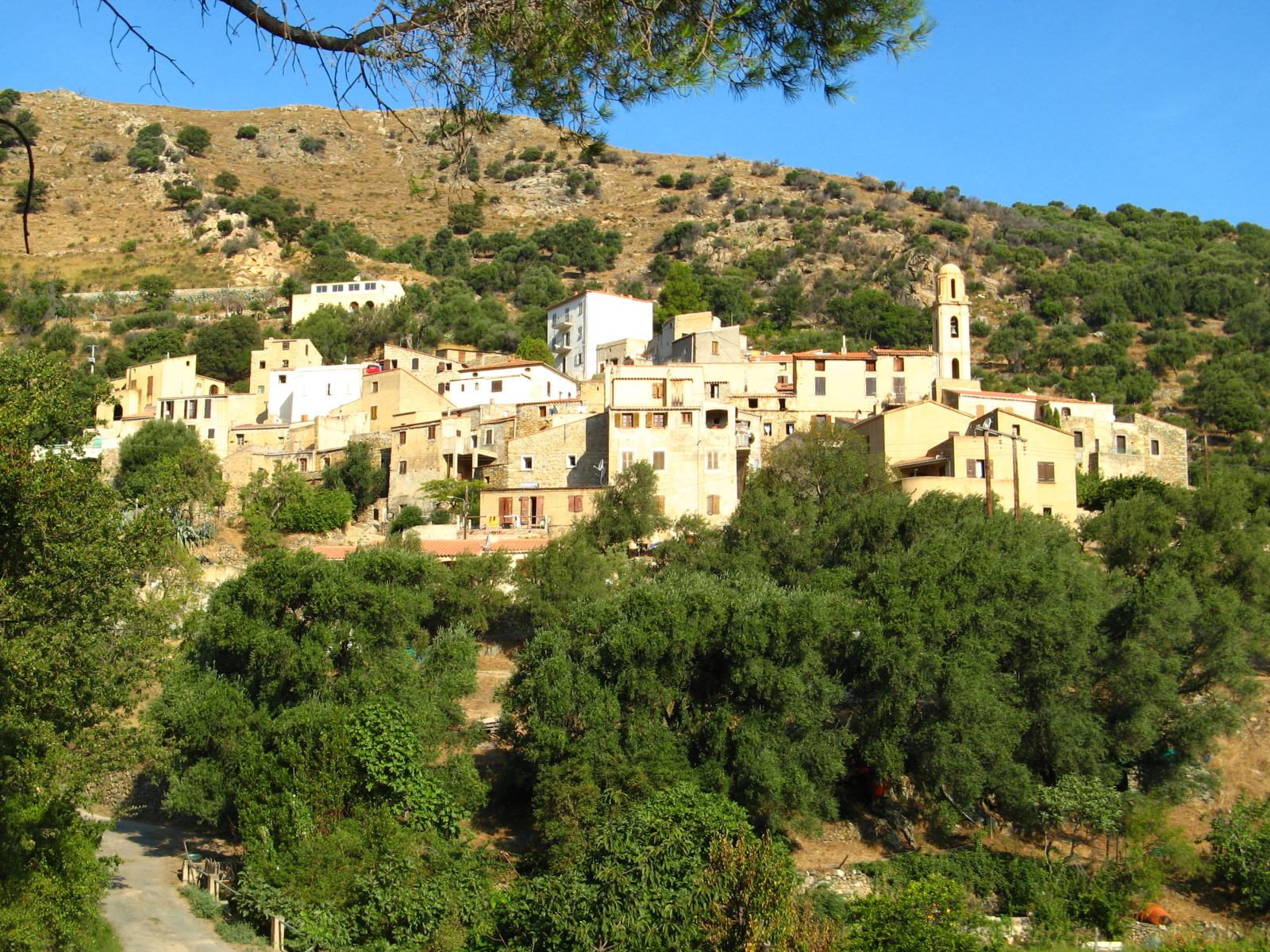 Vue générale d'Avapessa (Haute-Corse, France)